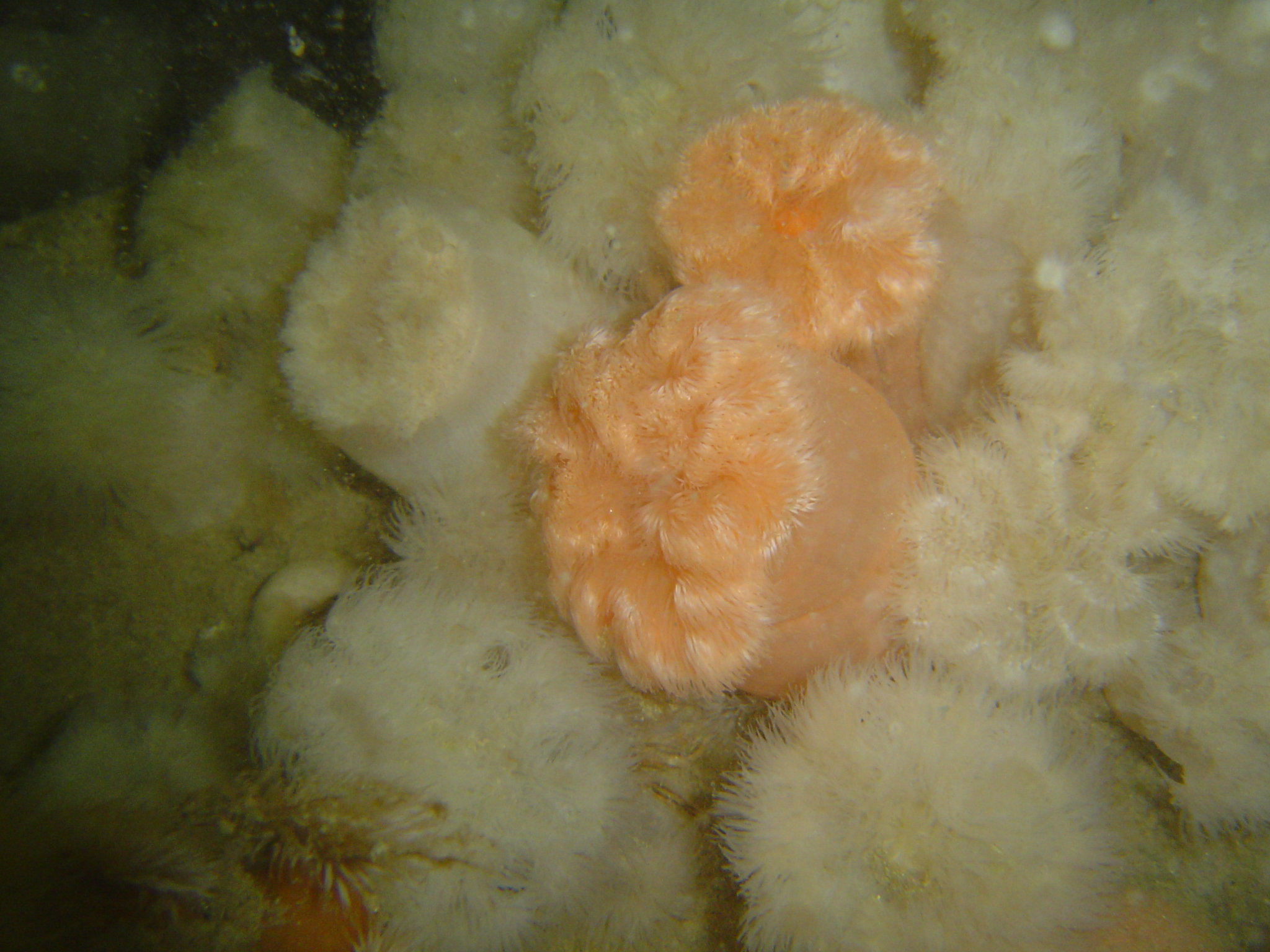 Meridum Senile en baie de somme sur l'épave du Nytaar.